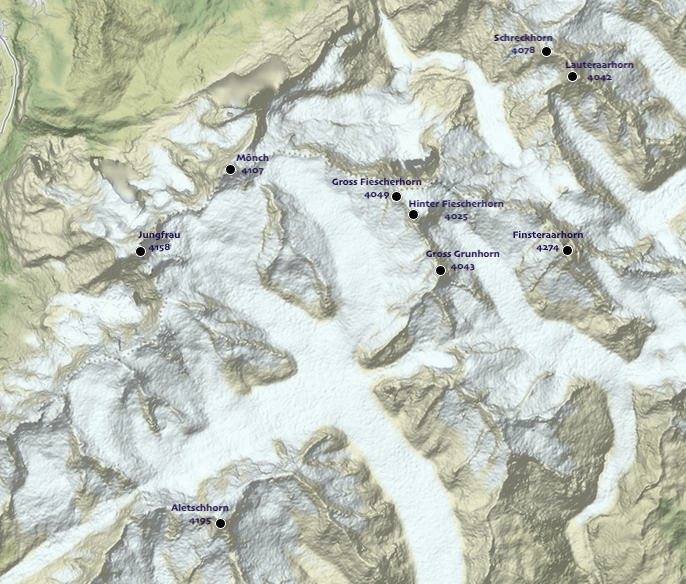 carte réalisée sur umap This map may be incomplete, and may contain errors. Don't rely solely on it for navigation.